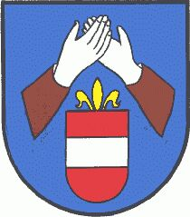 Wappen der Gemeinde Friedberg